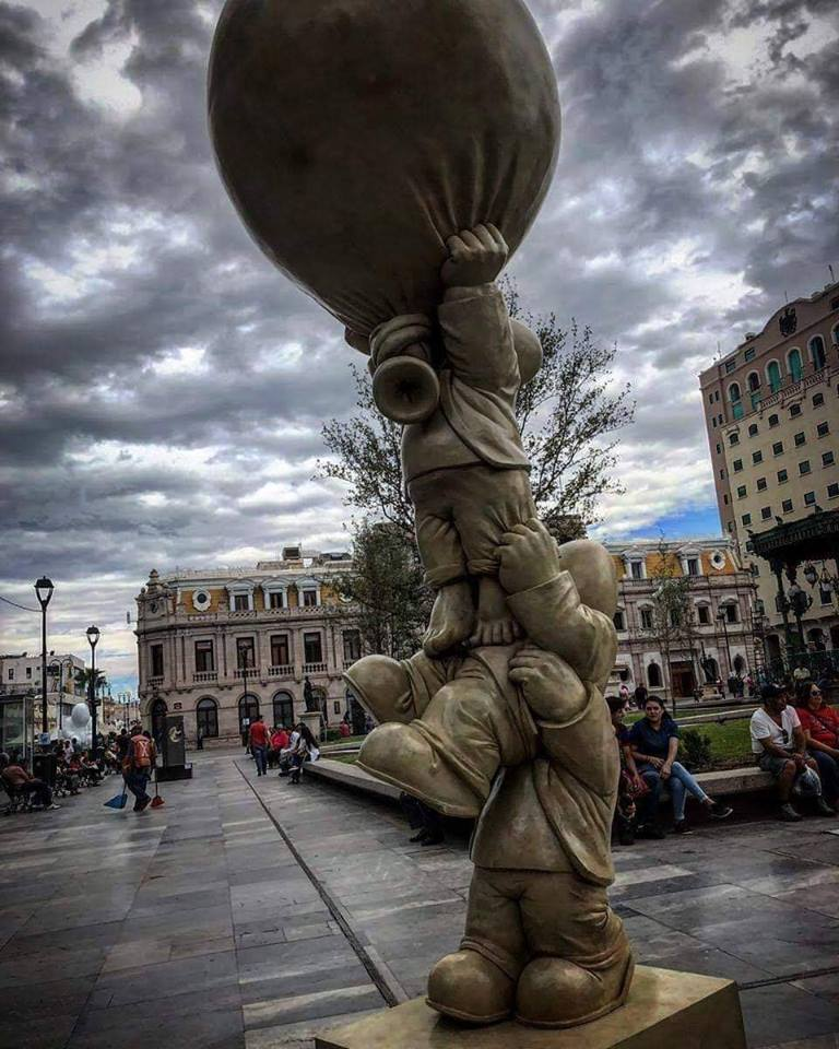 Escultura de la exposicion timoteo en plaza de armas